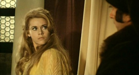 Képkocka a „Különleges történetek” című filmből